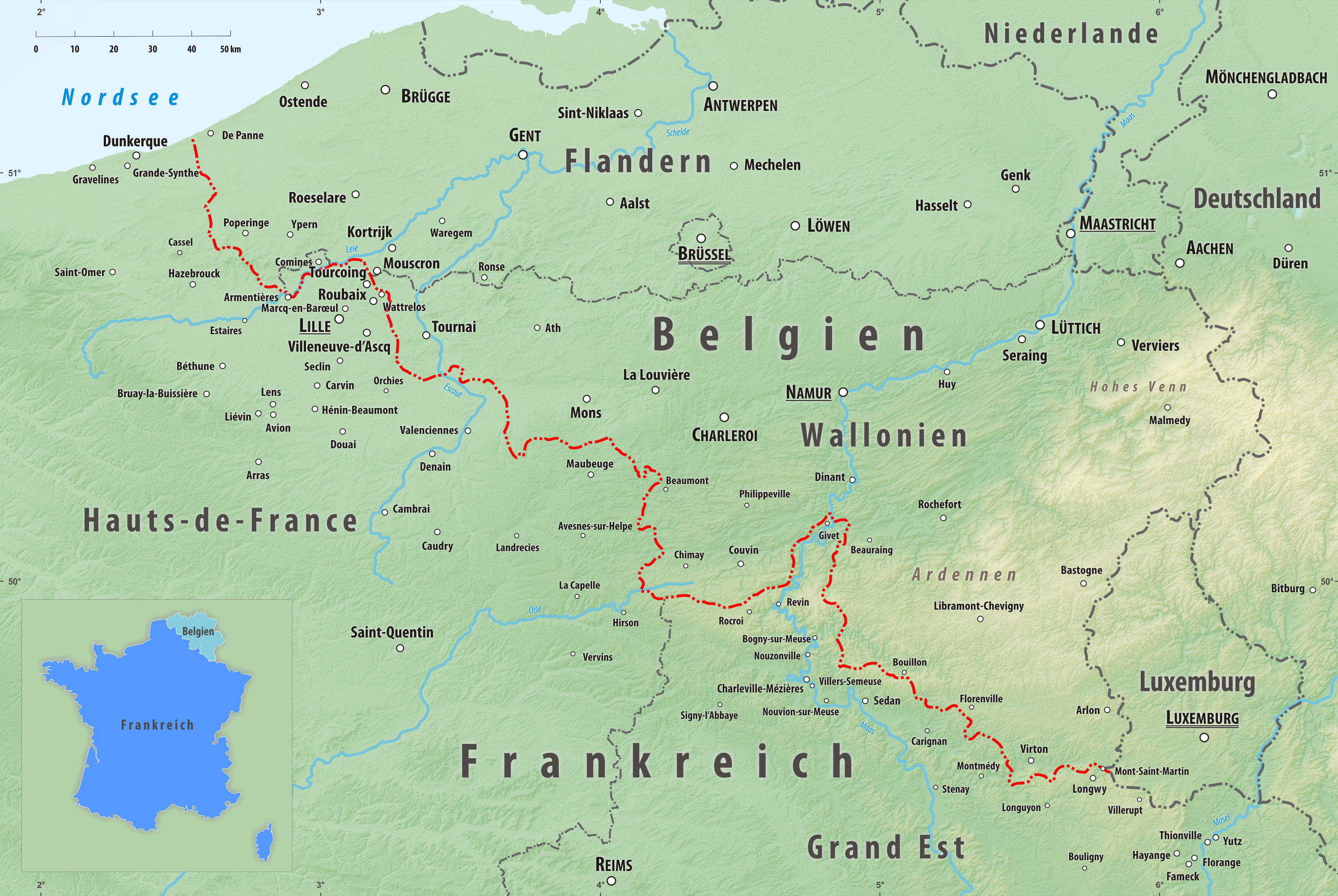 Reliefkarte des Grenzverlaufes zwischen Frankreich und Belgien Topographischer Hintergrund: NASA Shuttle Radar Topography Mission (public domain). SRTM3 v.2.